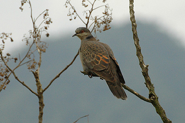 Uganda Dusky Turtle-dove Streptopelia lugens